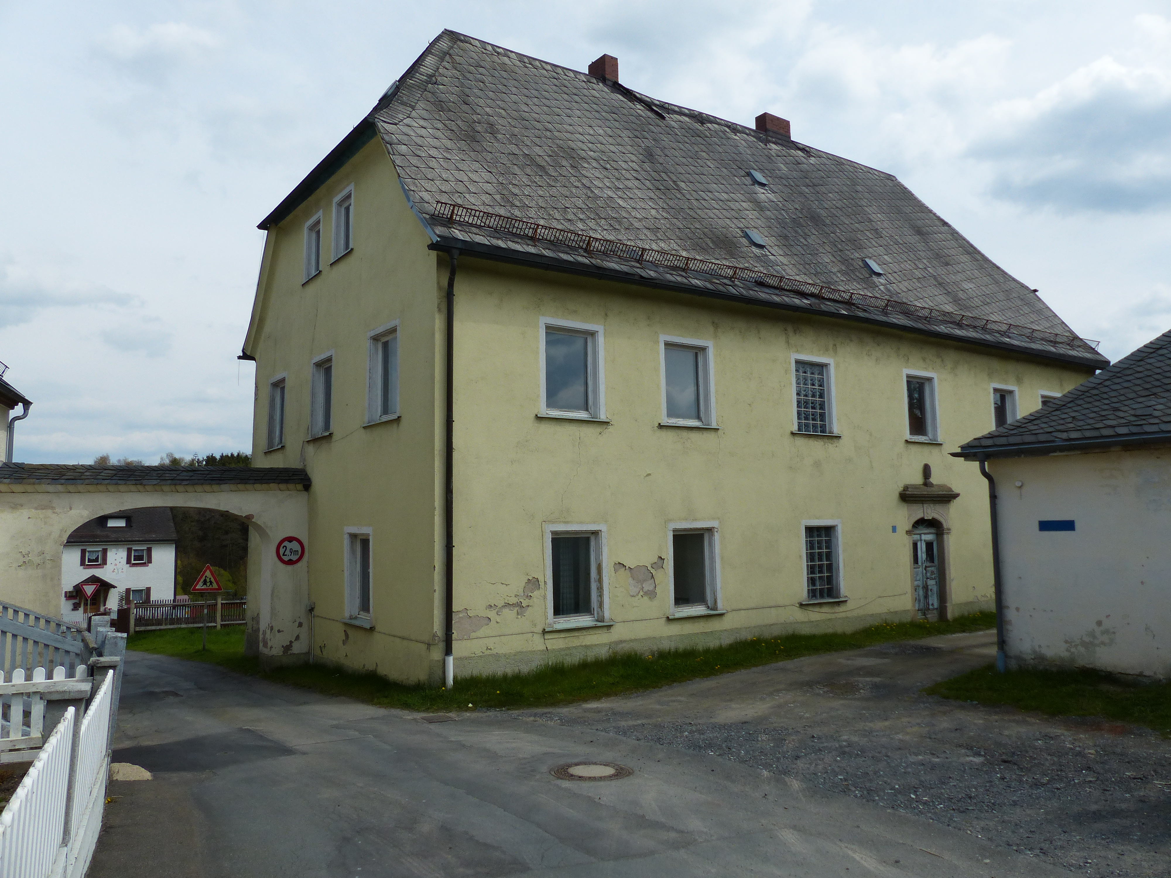 Serie Baudenkmäler und Ansichten von Regnitzlosau